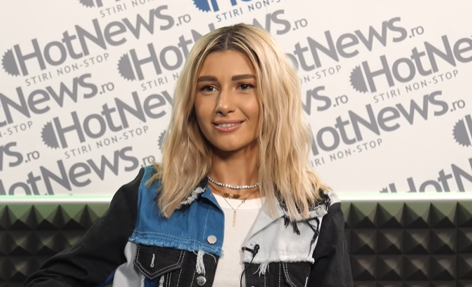 Secvență dintr-un interviu al Alinei Eremia pentru HotNews